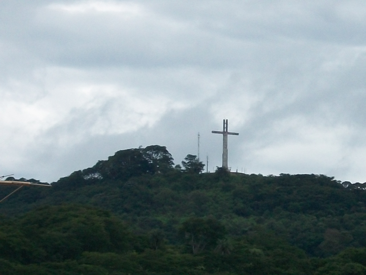 Morro do Cruzeiro, na cidade de São Simão - SP; em 20 de fevereiro de 2010.